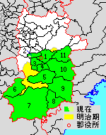 奈良県吉野郡の範囲（1.吉野町 2.大淀町 3.下市町 4.黒滝村 5.天川村 6.野迫川村 7.十津川村 8.下北山村 9.上北山村 10.川上村 11.東吉野村 薄緑：後に他郡から編入した区域 薄黄：後に他郡に編入された区域）